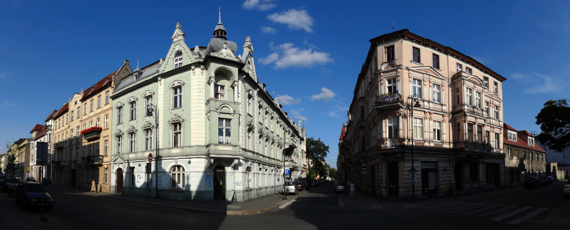 Ulica Augusta Cieszkowskiego w Bydgoszczy. Widok z ul. Pomorskiej